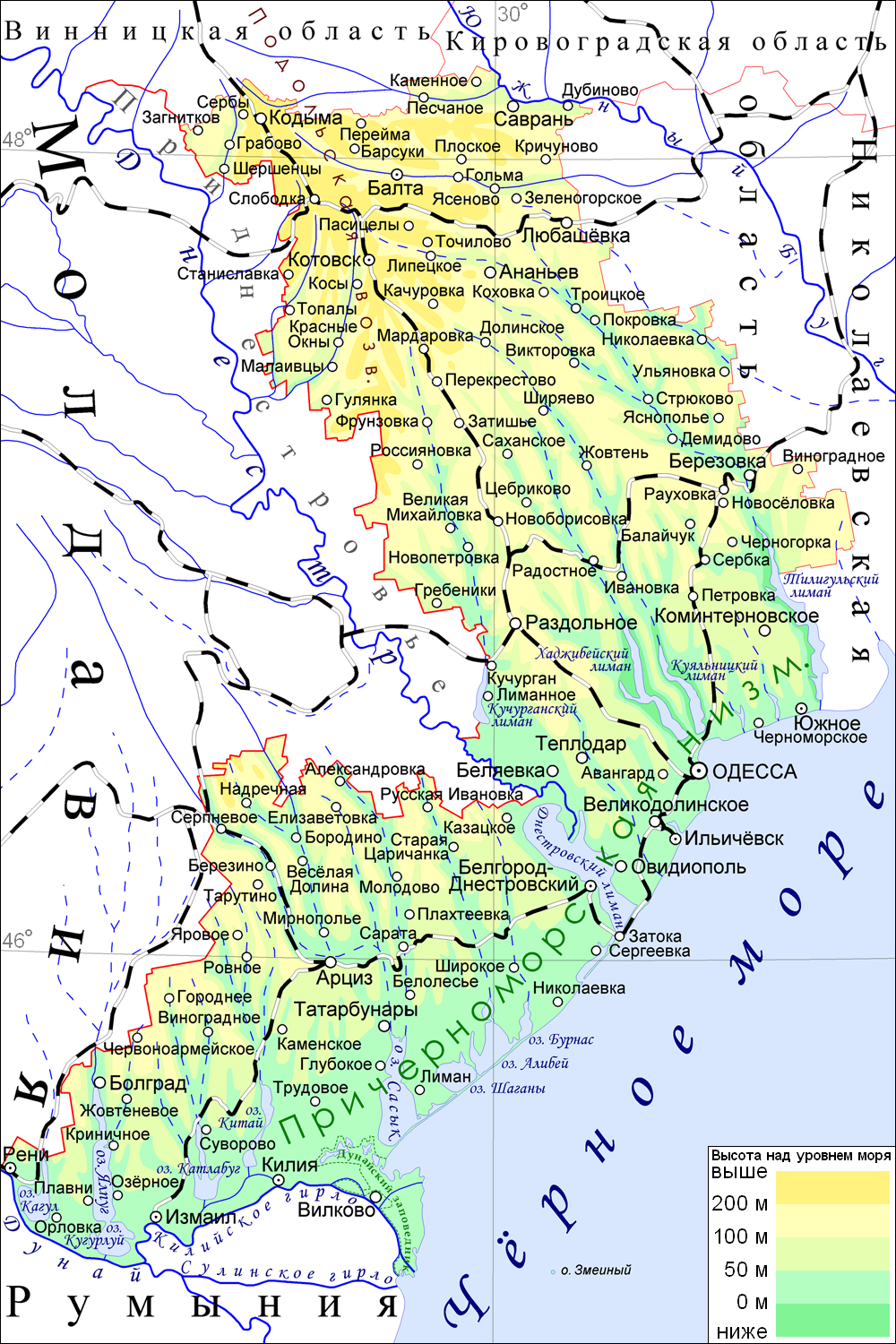 Физическая карта Одесской области